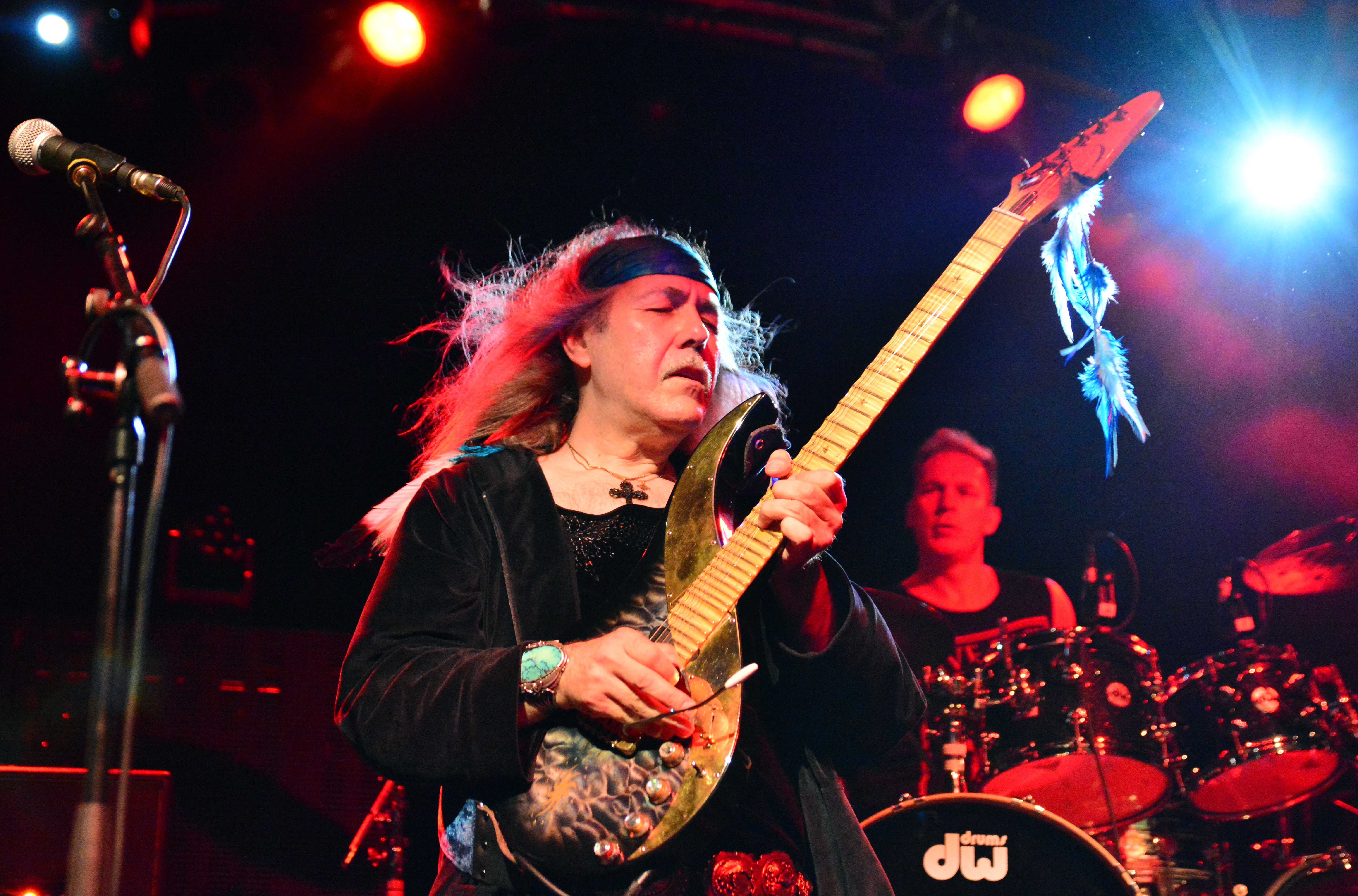 Uli Jon Roth bei den Hamburg Metal Dayz 2015